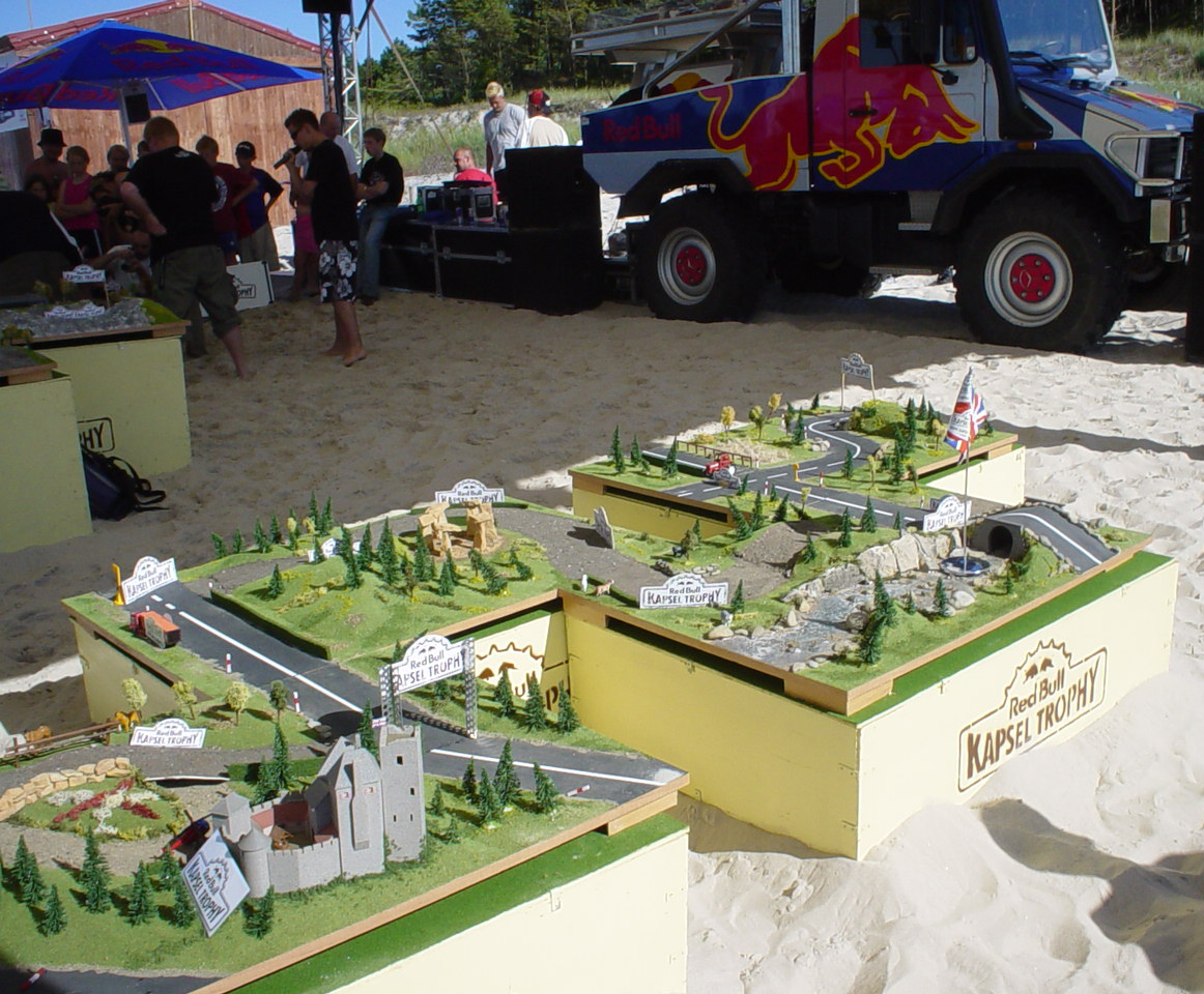 Red Bull Kapsel Trophy. Impreza na plaży w Łebie (Poland).